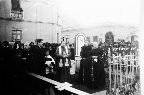 El Obispo de Salta, Julio Campero y Aráoz presidiendo una ceremonia religiosa en el atrio del convento de San Francisco de la ciudad de Salta.